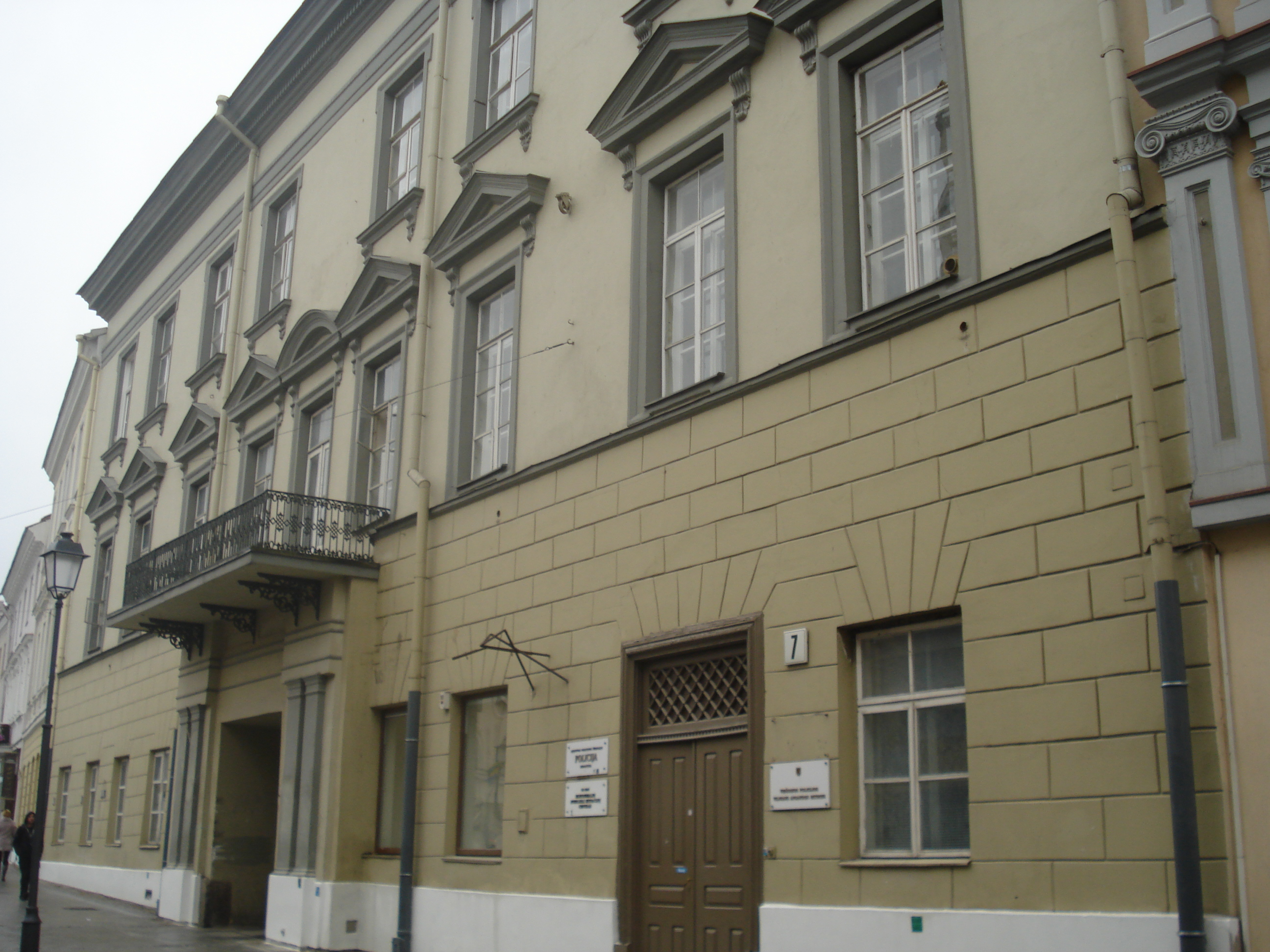 Pac Palace in Vilnius (Didžioji g. 7). Main fasade